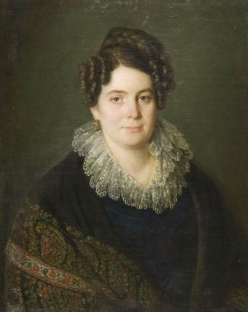 Надежда Тимофеевна Карташевская, ур. Аксакова (1794-1887).